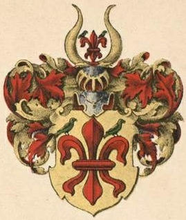 Elmpti suguvõsa vabahärravapp